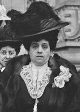 Marie-Louise Loubet en 1906.